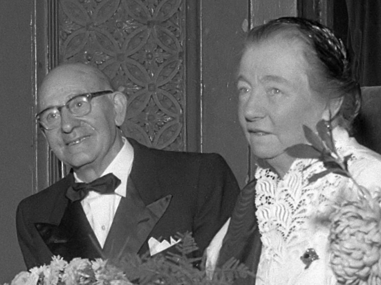 Jubileumvoorstelling Aaf en Herman Bouber 25 november 1955